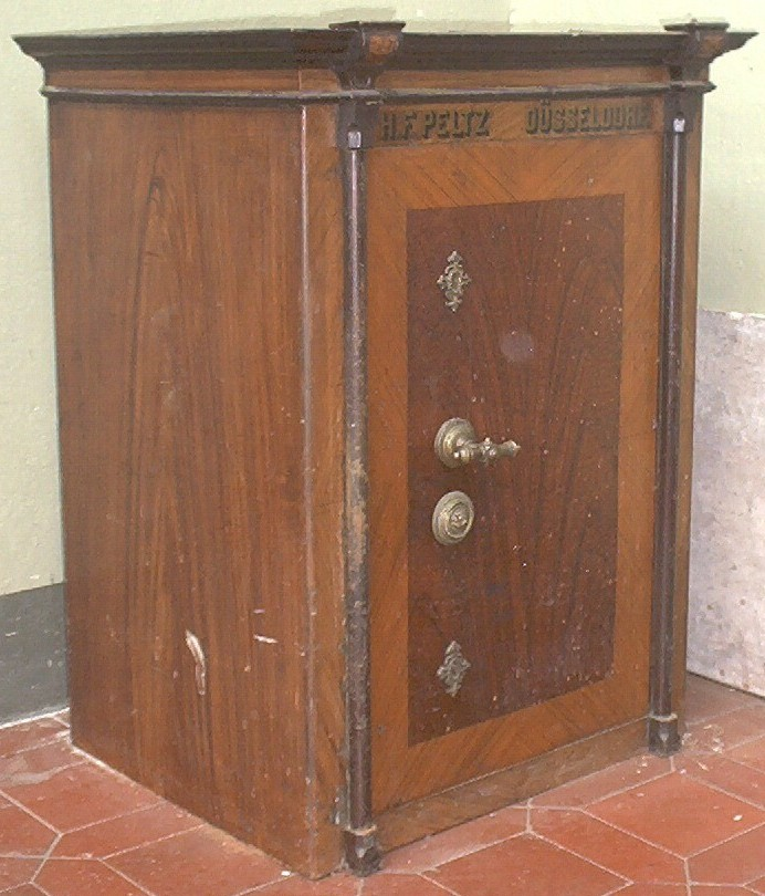 Tresor